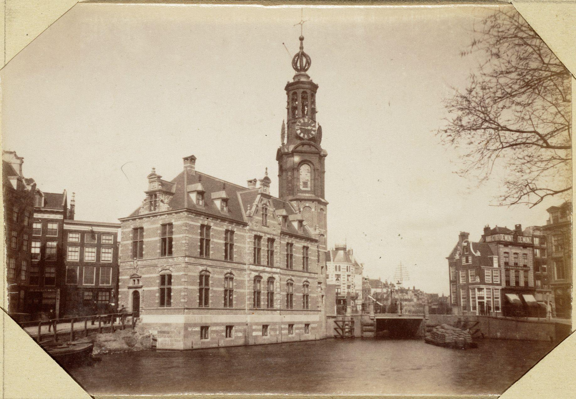 Beschrijving Het nieuwe Muntgebouw aan het Singel, ziende op de ReguliersbreestraatHet Singel gezien naar de Munttoren met het vernieuwde Muntgebouw. Links de zijgevel van Kalverstraat 236 en de panden Kalverstraat 223-225. Reguliersbreestraat 1, rechts op de achtergrond, is nog niet vervangen door de nieuwbouw naar ontwerp van architect Evert Breman. Foto oorspronkelijk uitgegeven door A. Jager. Foto 262 uit het album van W.J.R. DreesmannDocumenttype fotoVervaardiger Jager, A.Collectie Collectie Atlas DreesmannDatering 1887 t/m 1888Geografische naam ReguliersbreestraatKalverstraatSingelInventarissen 010094000680 Generated with Dememorixer